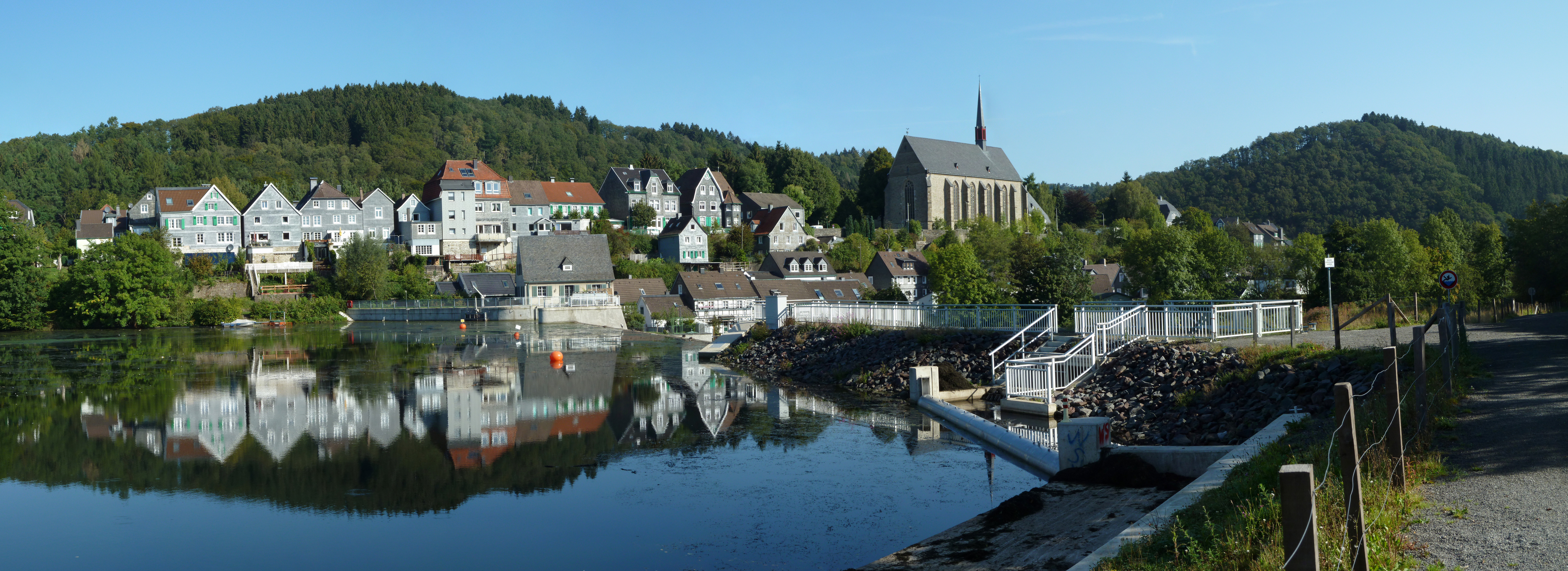 Beyenburger Freiheit und Klosterkirche, WuppertalThis is a photograph of an architectural monument. 238